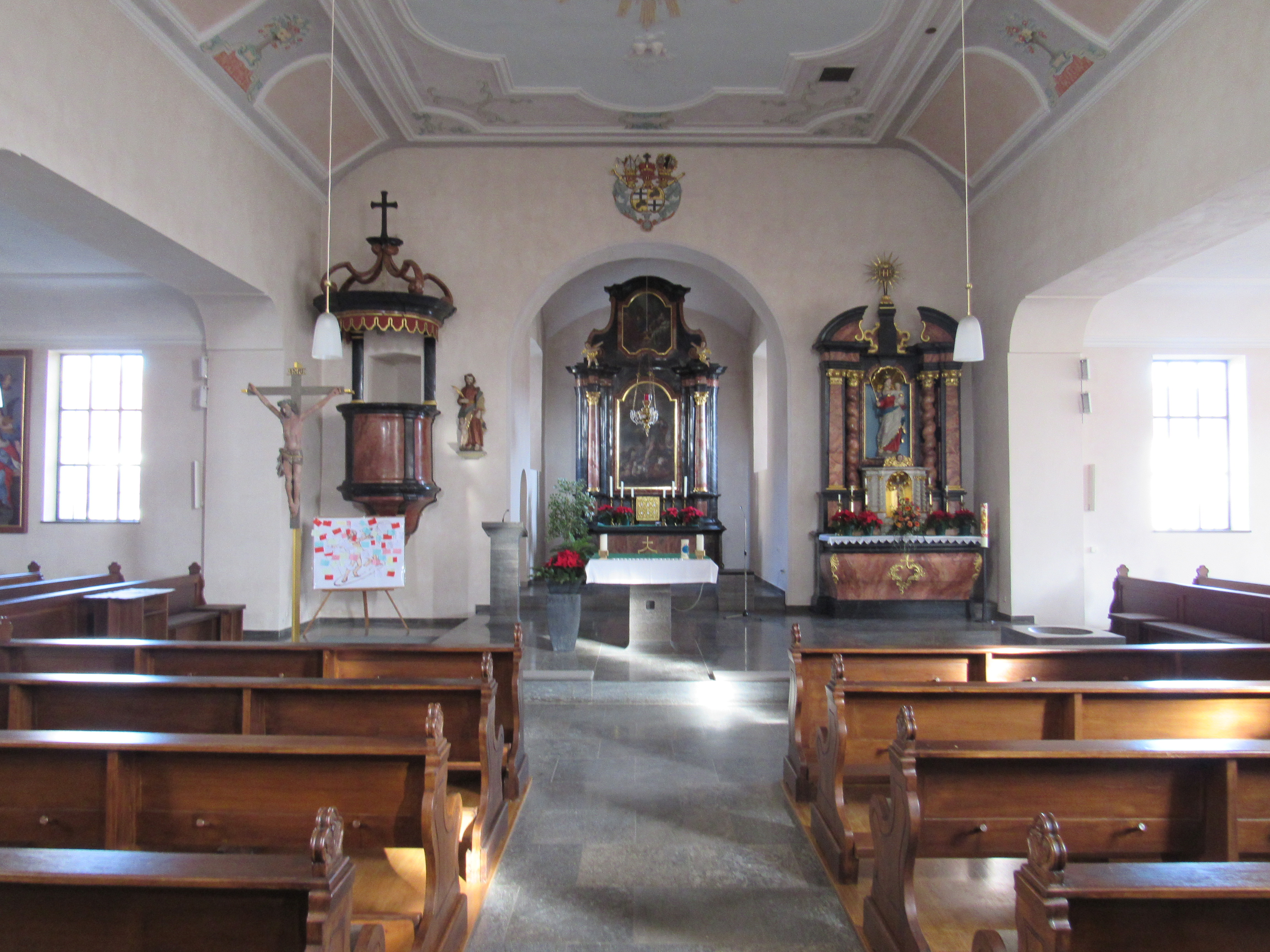 Innenraum der Kirche von Kothen, Gemeinde Motten